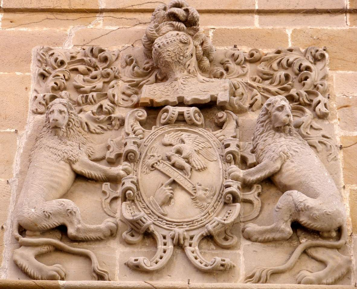 Casa Azkarraga, escudo de los García de Zuazo, en Salvatierra de Álava